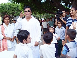 Juan Gabriel, en la plaza de Parácuaro. Uno de los grandes artistas paracuarenses.